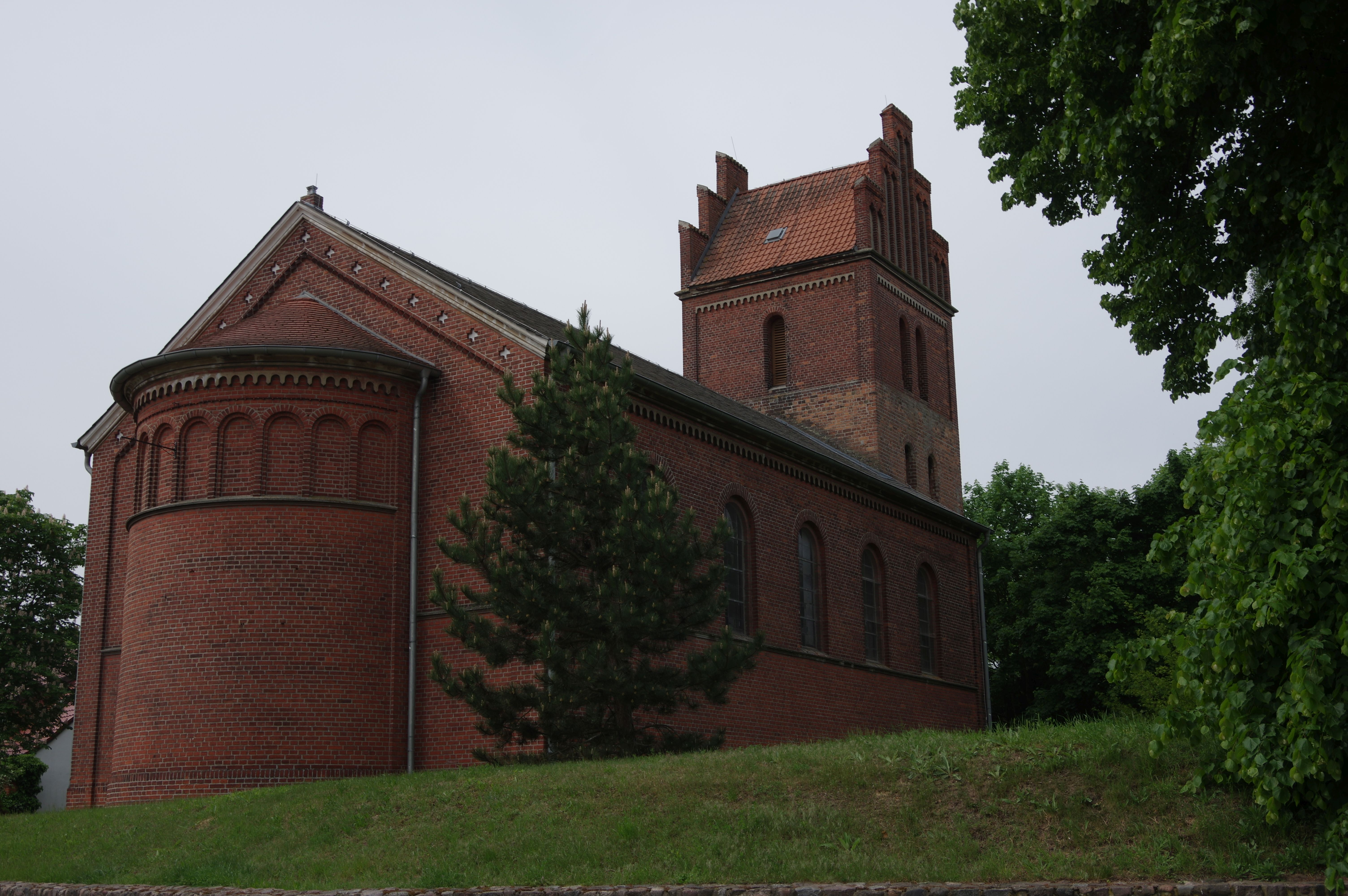 Brandenburg an der Havel. Das Gebäude (Ort im Namen) steht unter Denkmalschutz.